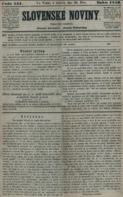 Slovenské noviny vychádzali v r. 1849 - 1861 vo Viedni.